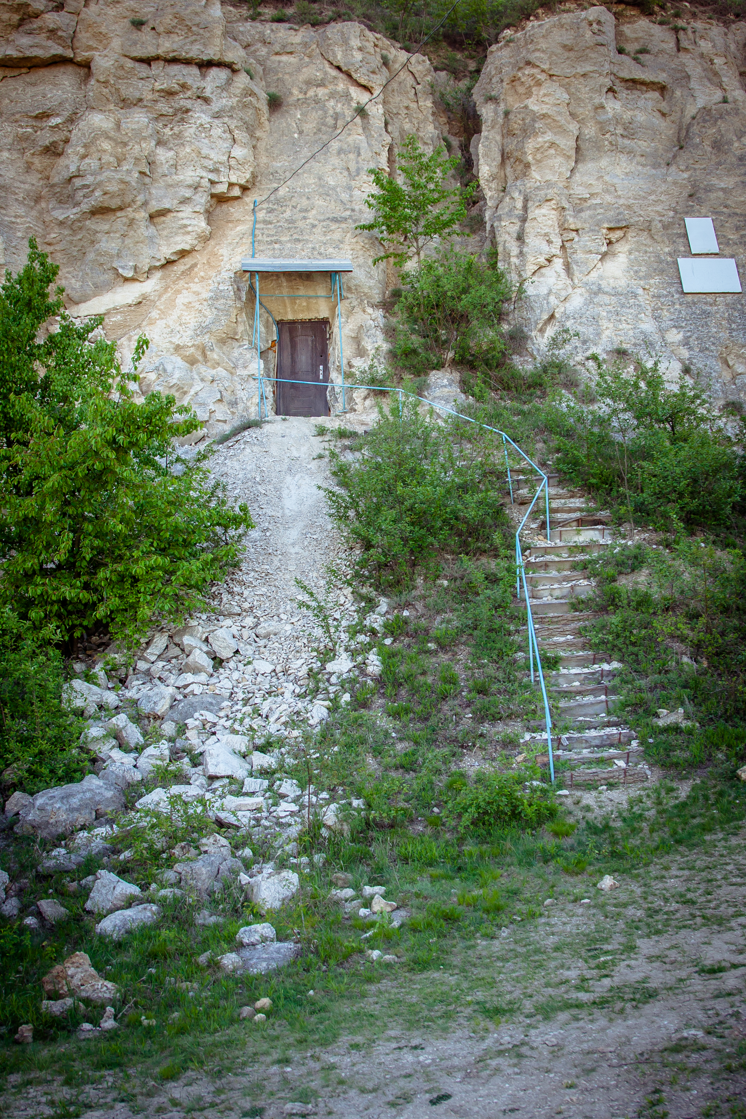 Печера Атлантида, Кам'янець-Подільський район, поблизу с. Завалля